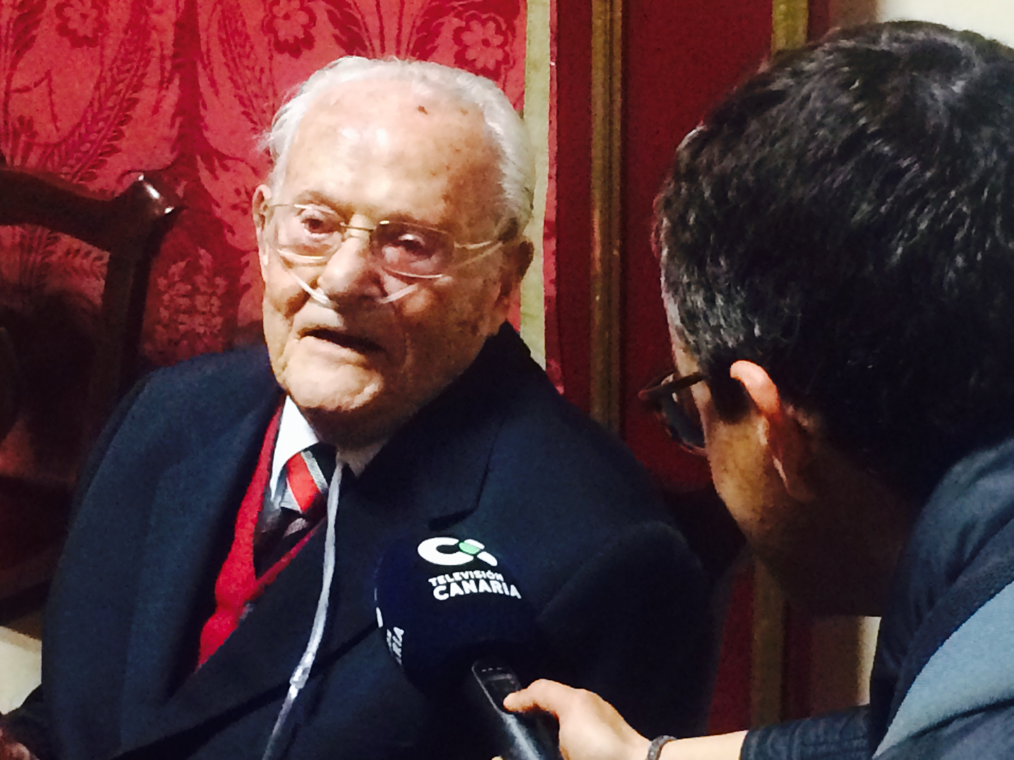 Leoncio Afonso entrevistado por Telecanarias el día de su homenaje en la Real Sociedad Económica de Amigos del País de Tenerife el 15 de febrero de 2017